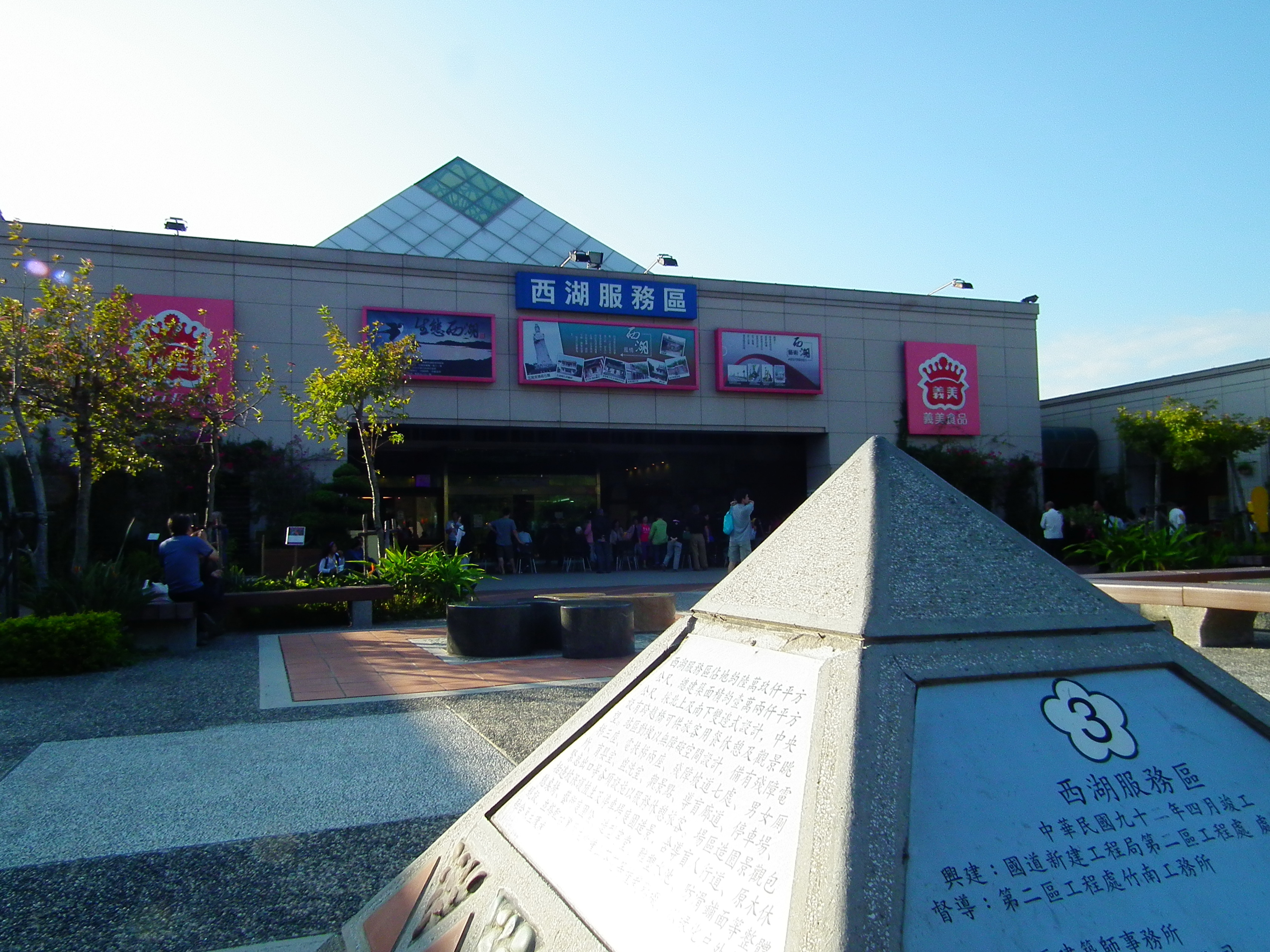 西湖服務區